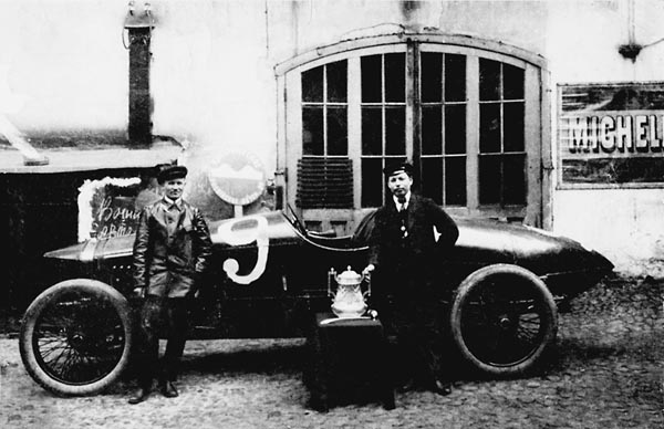 «Руссо-Балт» под номером 9, принимавший участие в автопробеге 1909 года Петербург–Рига–Петербург